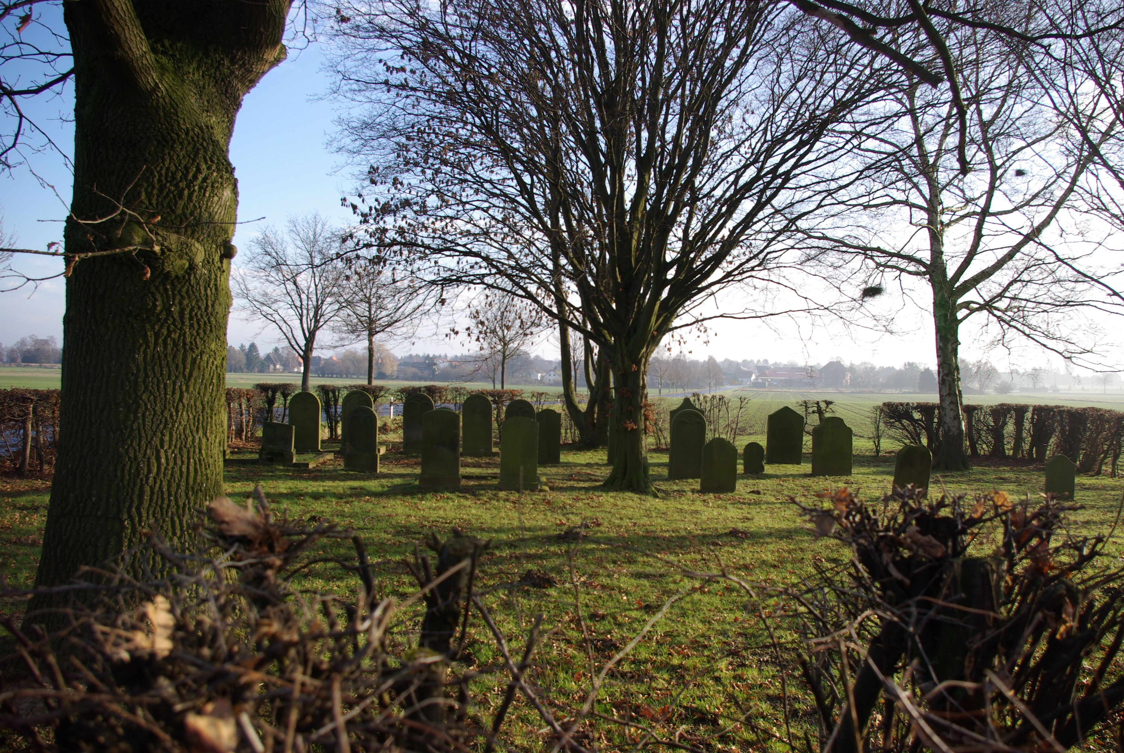 Springe Ortsteil Gestorf. Der Friedhof befindet sich außerhalb Gestorf an der Völkenser Straße.